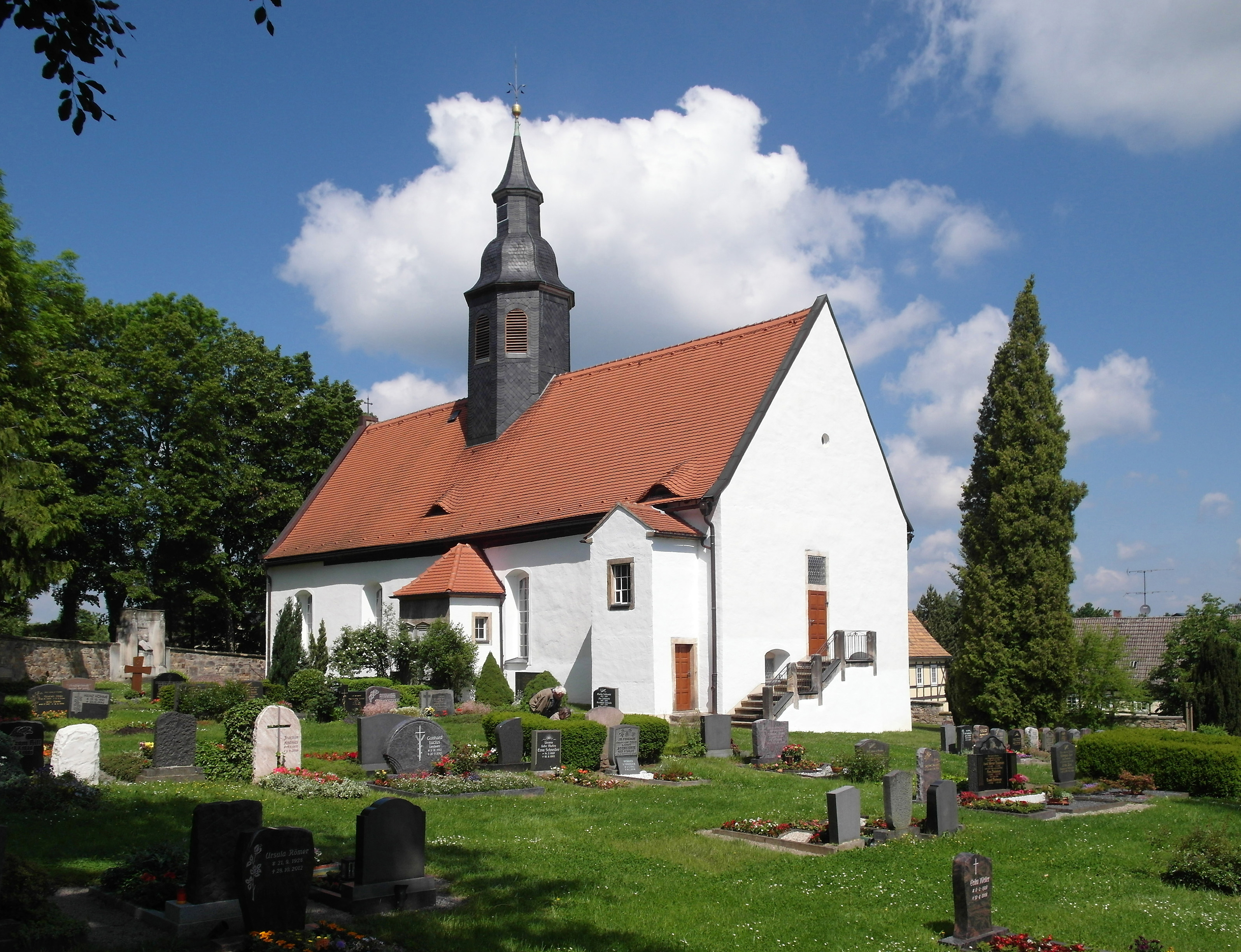 31.05.2014 01737 Fördergersdorf (Tharandt), Pfarrgasse (GMP: 50.994426,13.542902): Dorfkirche. Wahrscheinlich entstand hier eine Wegkapelle schon mit dem Waldhufenreihendorf um 1150, der Sage nach ggf. auch noch früher. 1995/96 stellte sich heraus, daß in der jetzigen Dorfkirche noch bedeutende Teile der romanischen Saalkirche aus dem 12. Jahrhundert vorhanden sind. Erstmals urkundlich erwähnt wird die Kirche 1346 im Meißner Bistumsmatrickel. 1429/30 wird sie durch die Hussiten geplündert und teilweise zerstört und erst 1517 wieder aufgebaut. Weitere Umbauten erfolgten 1856 und mit der Erweiterung der Kirche um vier Meter nach Westen für den Einbau einer neuen Orgel der Fa. Eule (Bautzen 1897). [SAM4528.JPG]20140531010DR.JPG/Blobelt